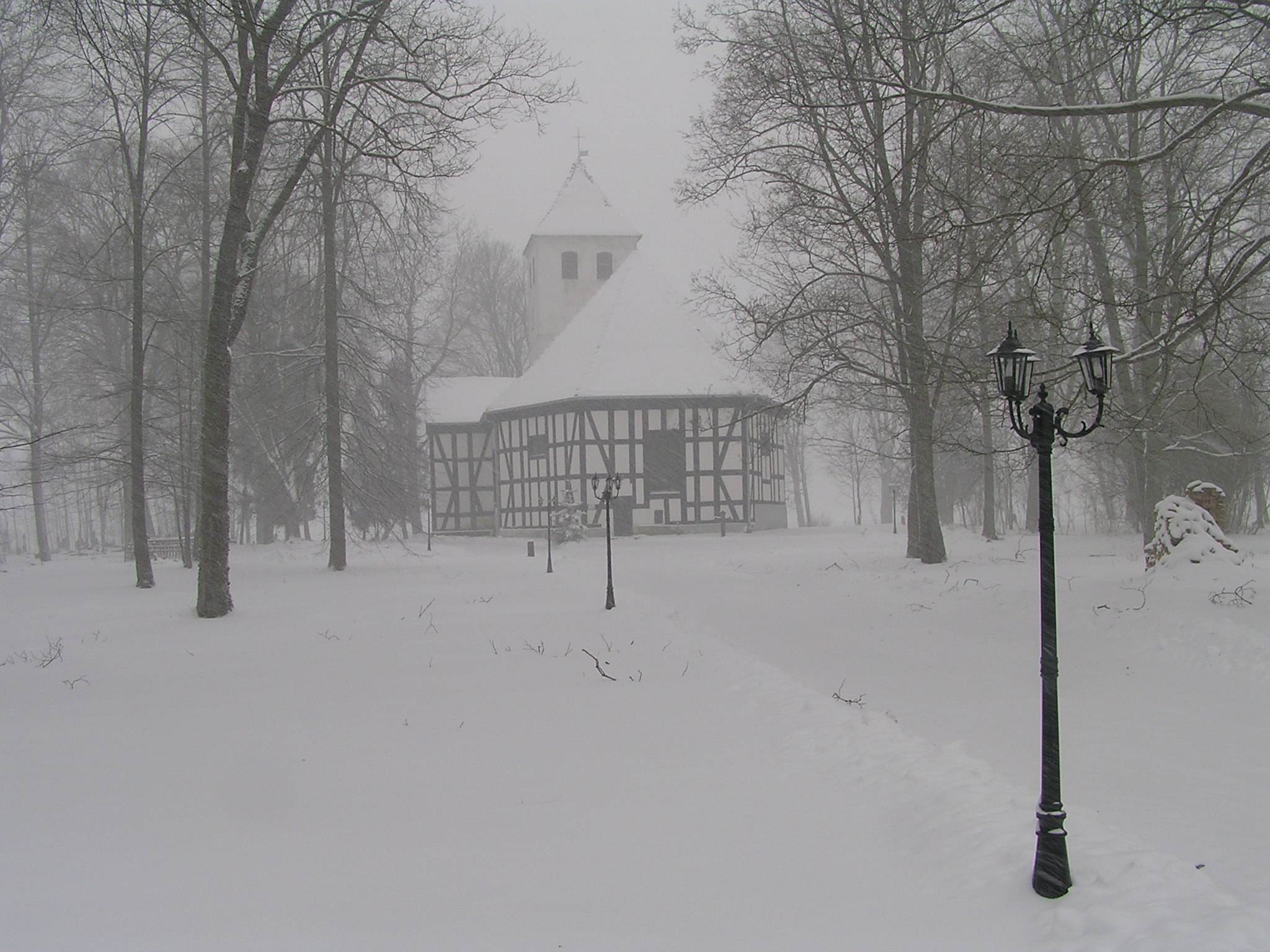 Jerutki - dawny kościół ewangelicki, od lat 80. XX w rzymskokatolicki filialny p.w. św. Maksymiliana Kolbe, 1715, 1821